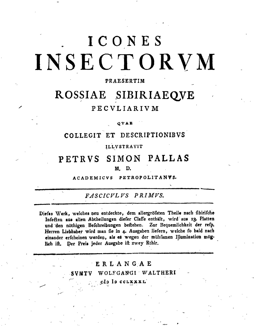 Page de titre d’Icones insectorvm praesertim Rossiae Sibiriaeqve pecvliarivm qvae collegit et descriptionibvs illustravit Petrvs Simon Pallas T. 1-3